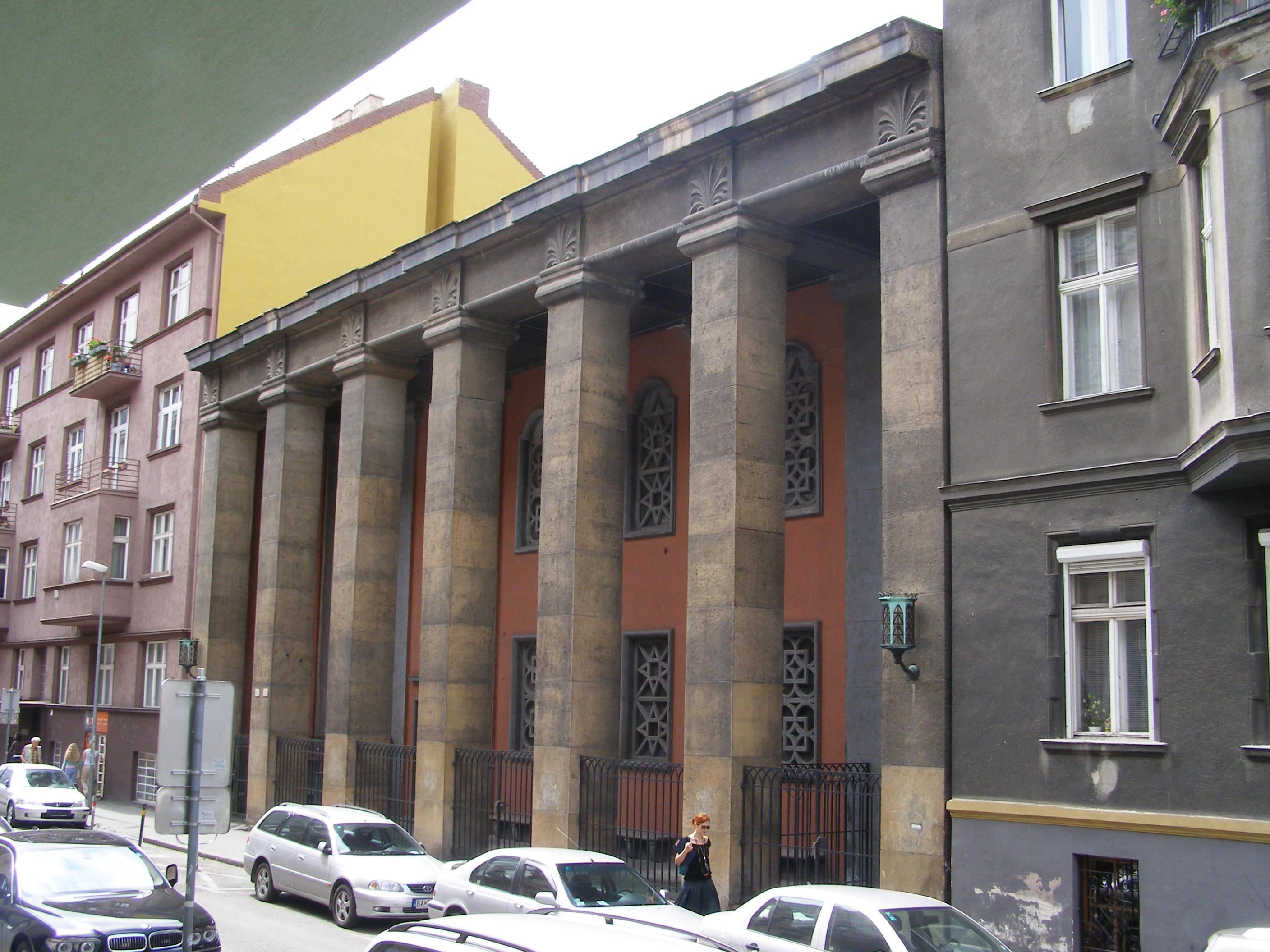 Synagogue, Heydukova street, Bratislava